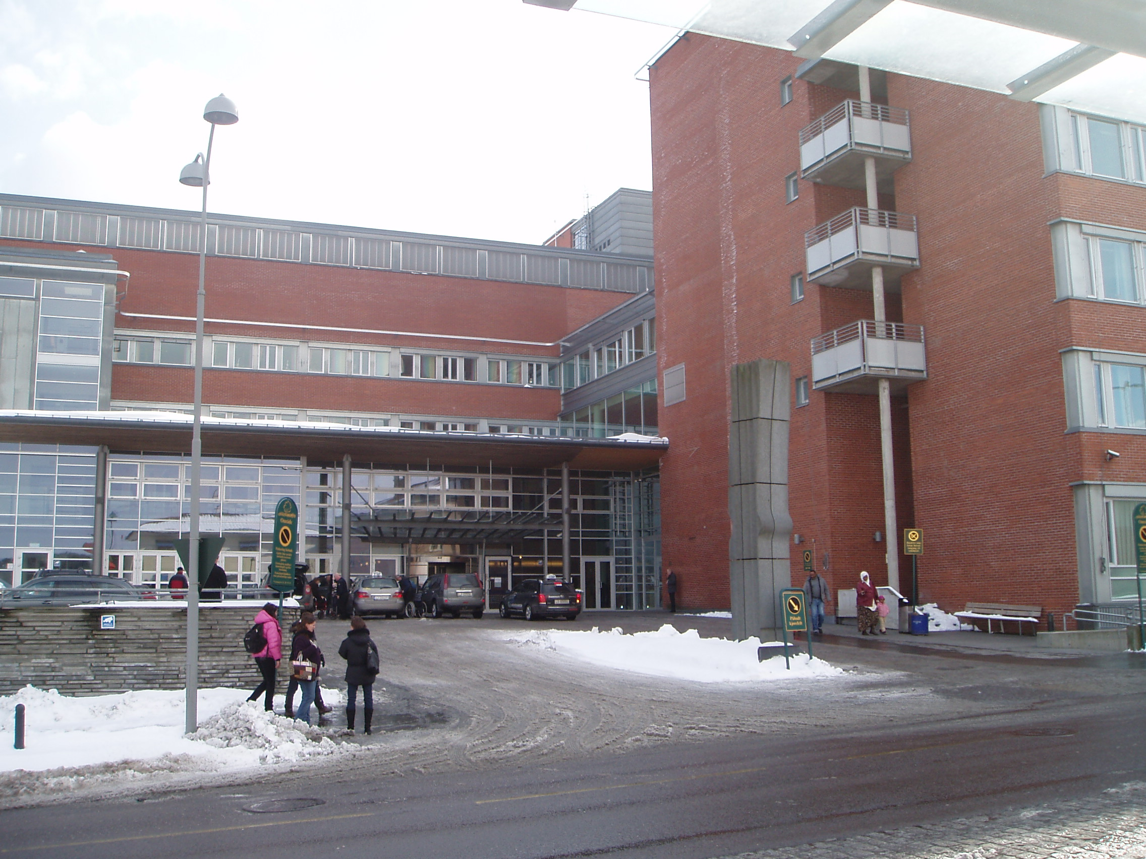 Hovedinngangen til Sykehuset i Vestfold, Tønsberg.